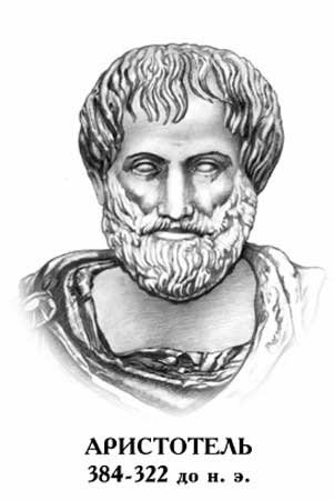 Аристотель